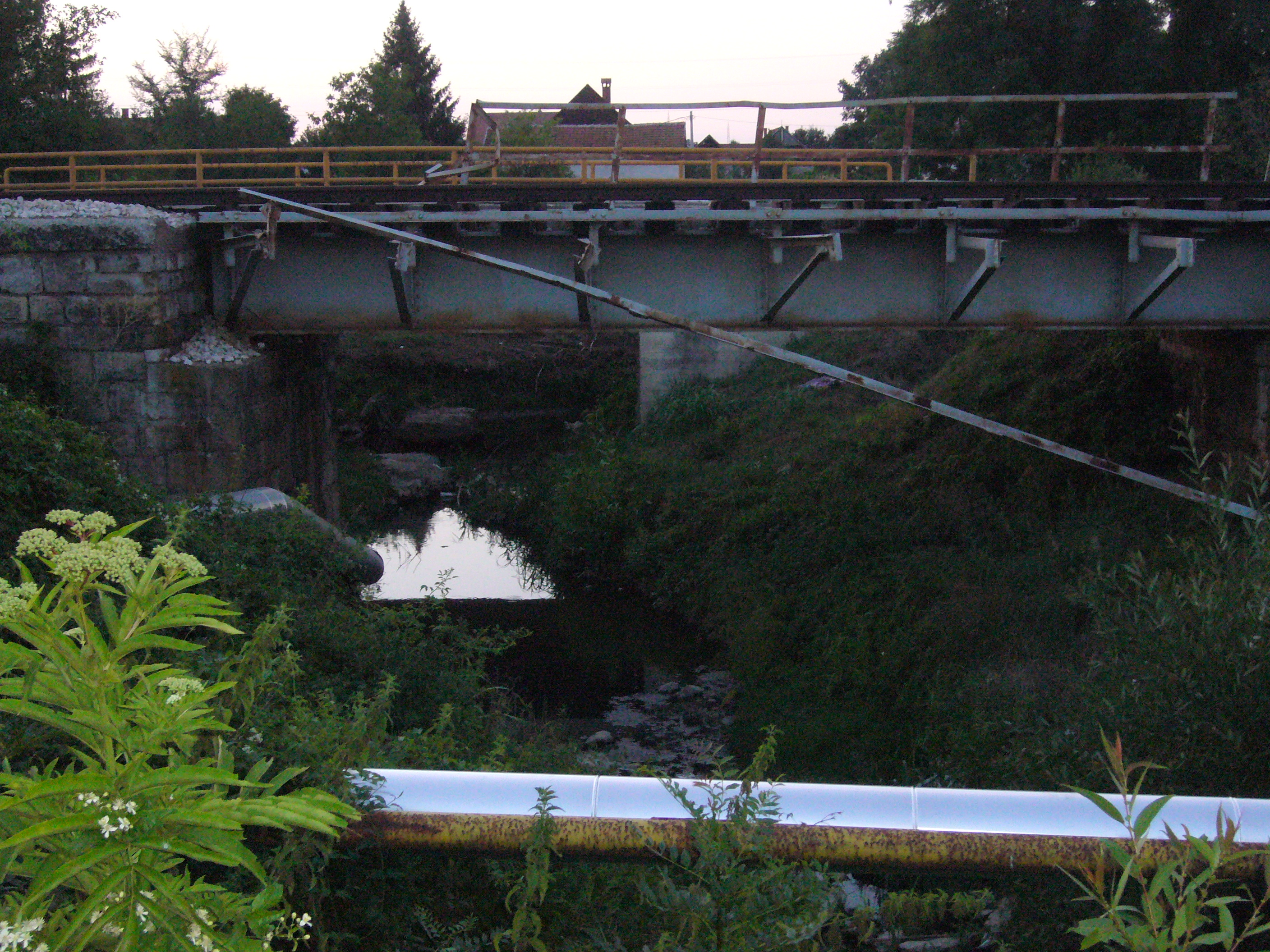 Река Кривошија.